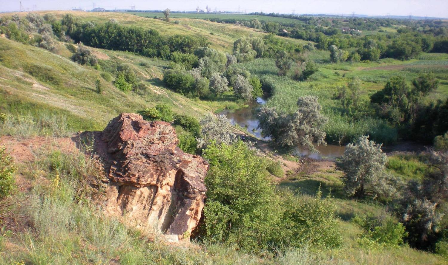 Вид на балку Кровецьку.